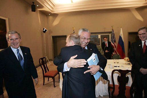 APEC Summit: Secretary of State Colin Powell receives a warm reception from Russian President Vladimir Putin during a meeting with President Bush and delegation members including Deputy National Security Advisor Stephen Hadley, far right, in Santiago, Chile, Nov. 20, 2004.